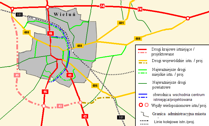 Schemat przebiegu obwodnicy wschodniej centrum Wielunia (zaznaczony seledynowo-niebieską linią)